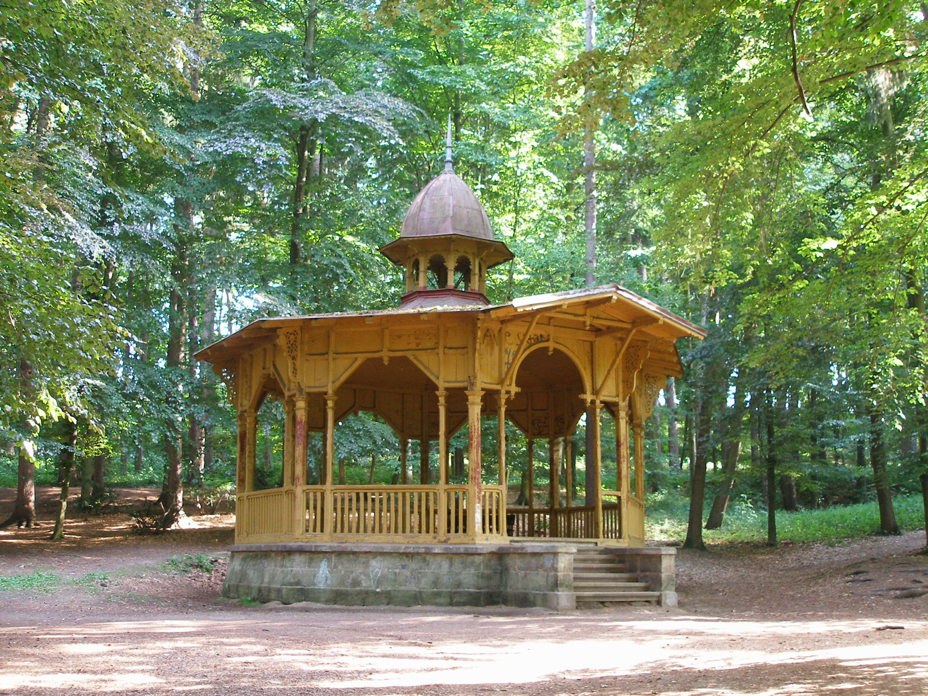 Hudební pavilónek v parku Štěpánka v Mladé Boleslavi.